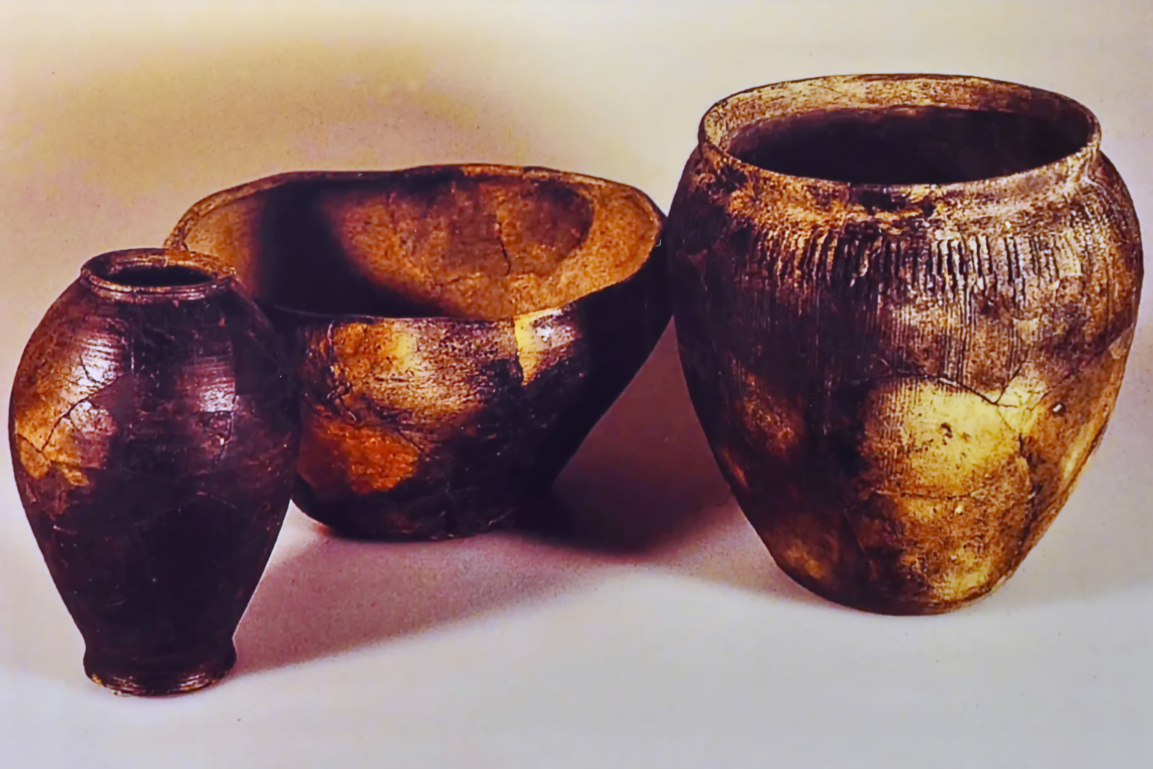 Lindenhof-Keller, Turicum / Oppidum Lindenhof (Zürich) : Spätkeltische Keramik vom Rennweg 5 (gemäss Beschriftung).